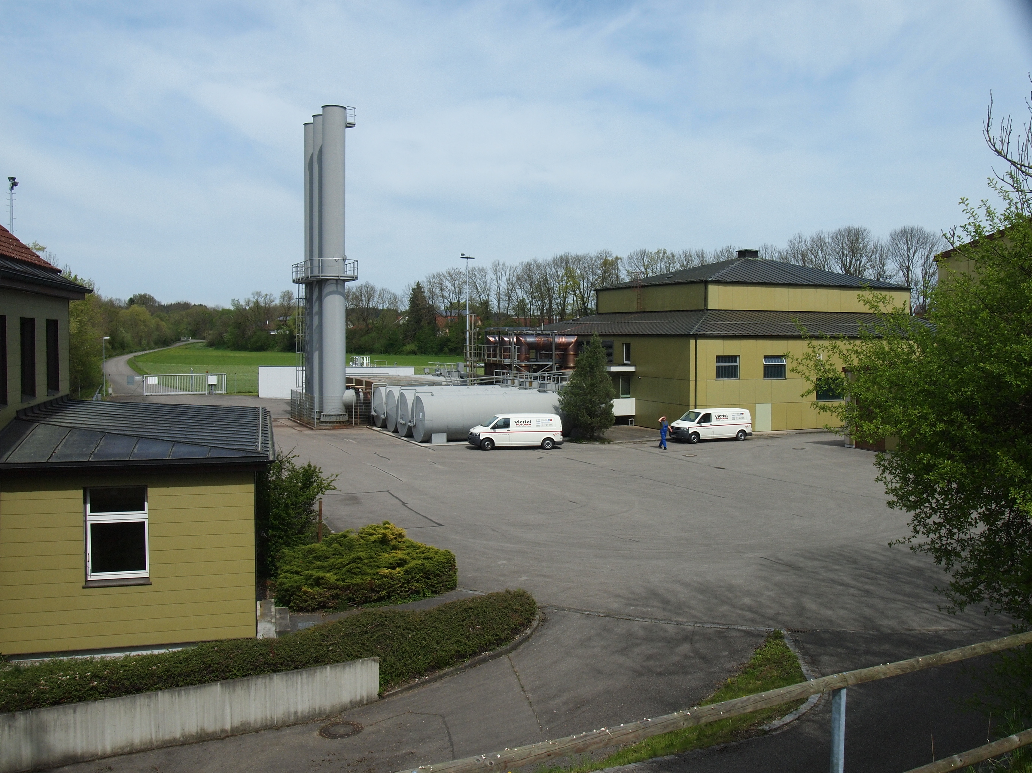 Kraftwerk Leinau. Links Maschinenhaus des Wasserkraftwerks, rechts das Dieselkraftwerk